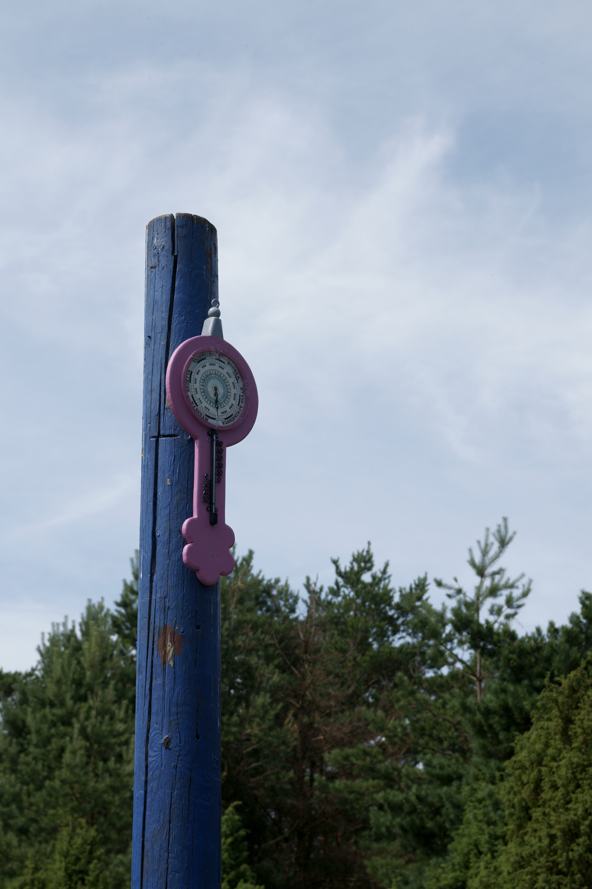 Muminwelt, Naantali: Der Pfahl mit dem Barometer der Hatifnatten aus dem Band Die Mumins. Eine drollige Gesellschaft